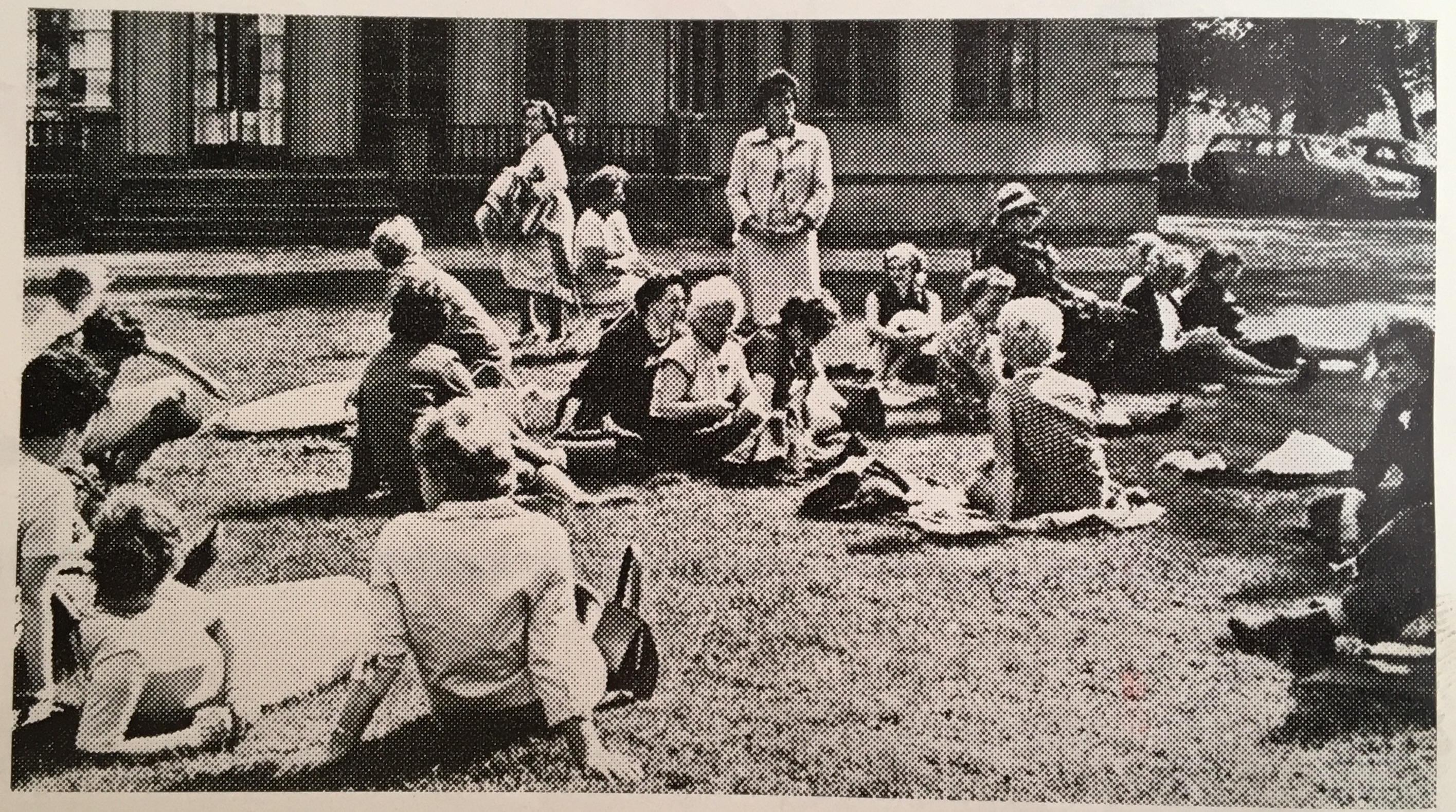 Annika Baude föreläser på rubriken ”Kön eller meriter – vad avgör i förvärvslivet?” för kontorister i KfS den 24 maj 1964 på Skytteholm.